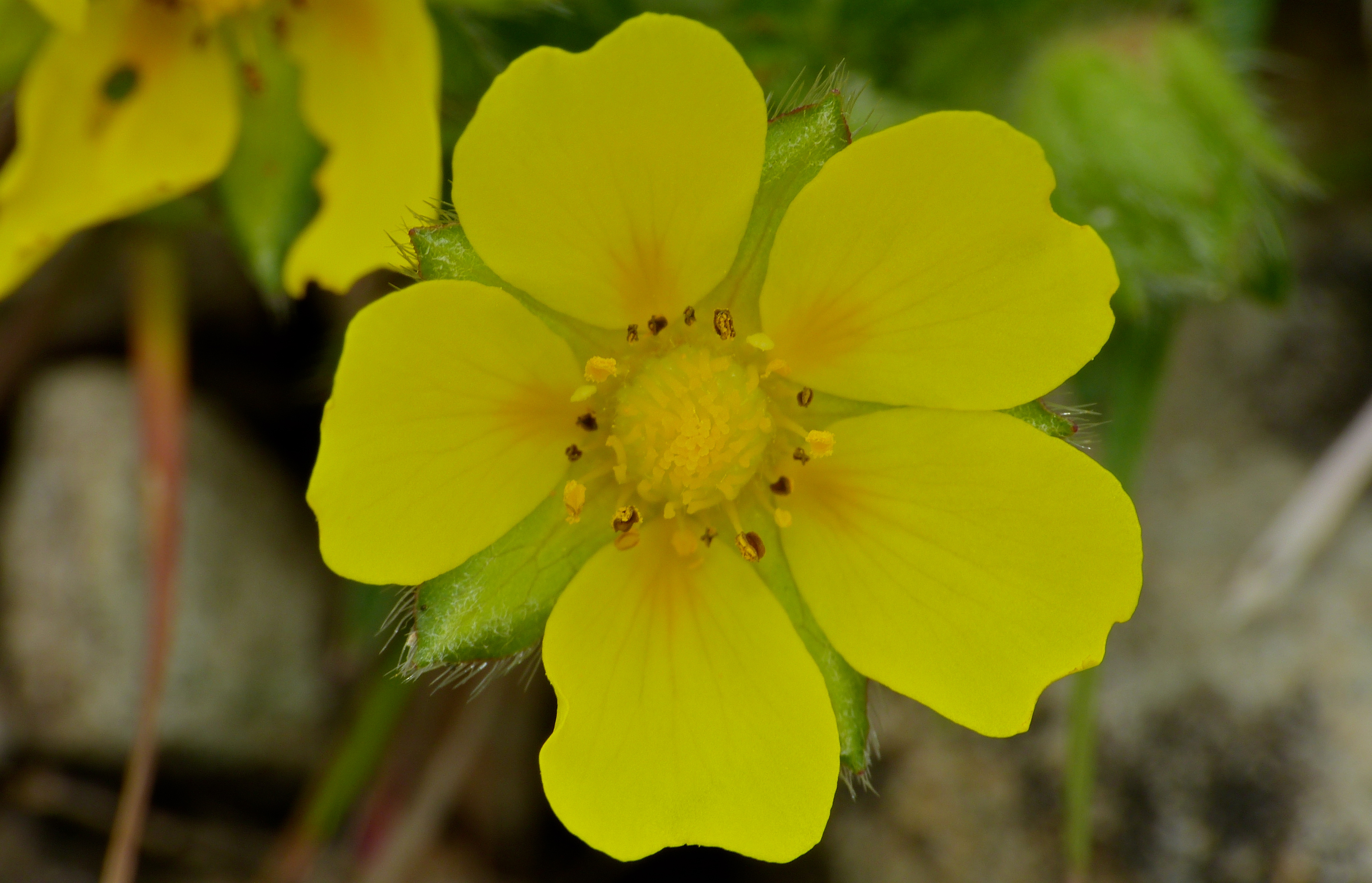 Aumelas, Hérault, FRANCE